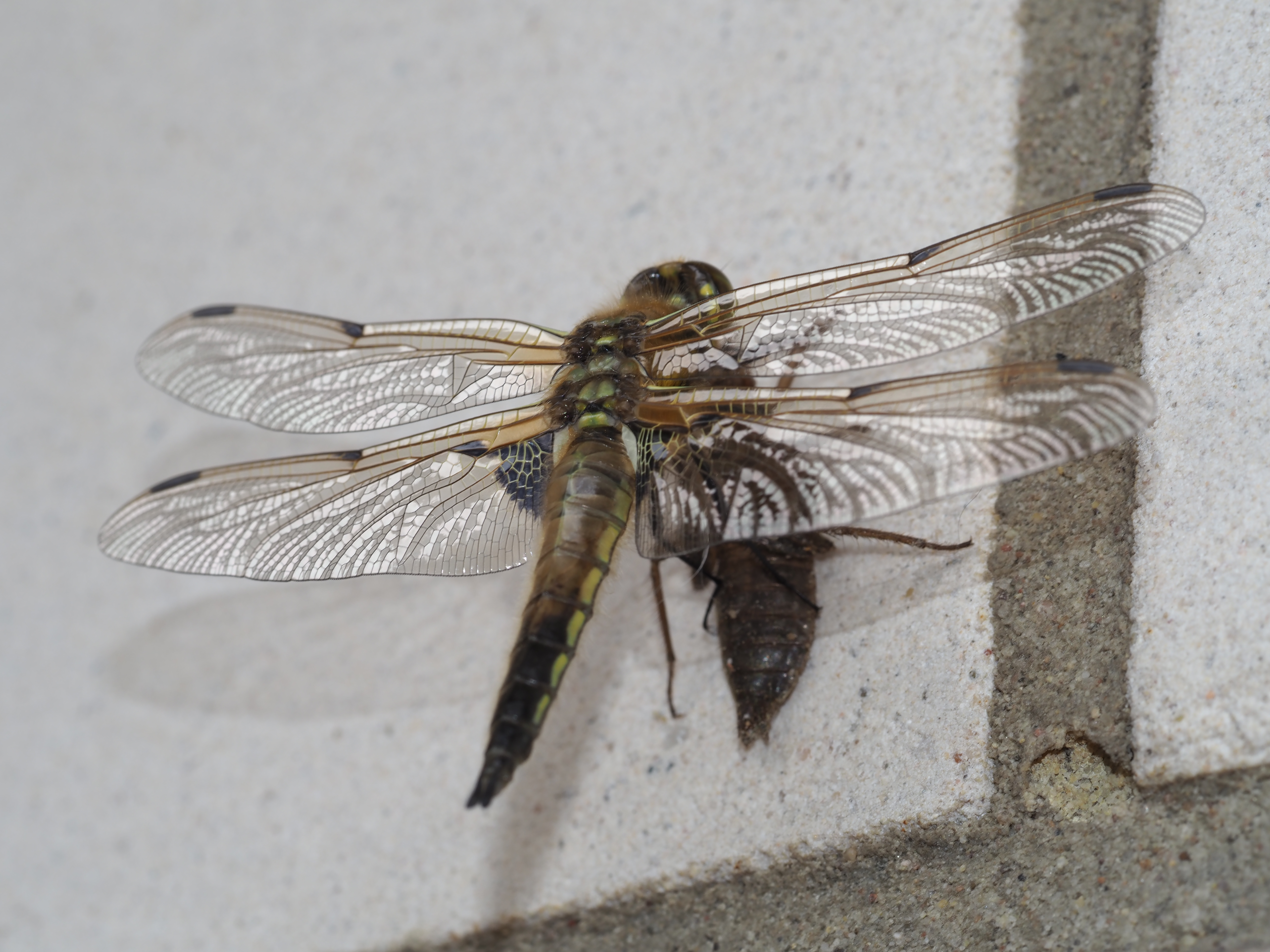 Libellula quadrimaculata Vierfleck, kurz zuvor geschlüpft, mit Exuvie (Häutungshemd) an der Hauswand.